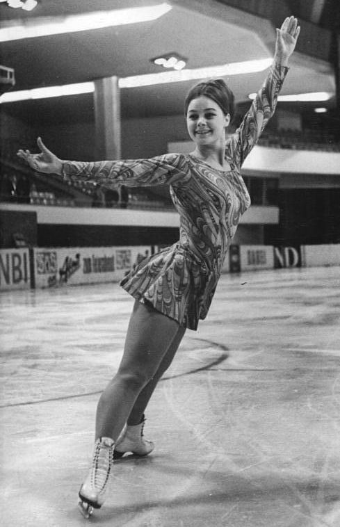 Gabriele Seyfert Zentralbild Wendorf 11.1.1968 Berlin: Vorbereitung Europameisterschaften im Eiskunstlaufen vom 23.-20.1.1968. Ihren Titel hat die 19jährige Karl-Marx-Städterin Gabriele Seyfert bei den bevorstehenden Europameisterschaften im schwedischen Vasteras zu verteidigen.